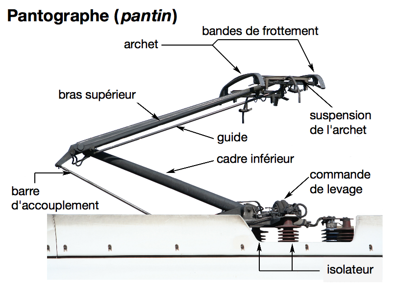 Plan du pantographe de l'ICE 3 allemand.